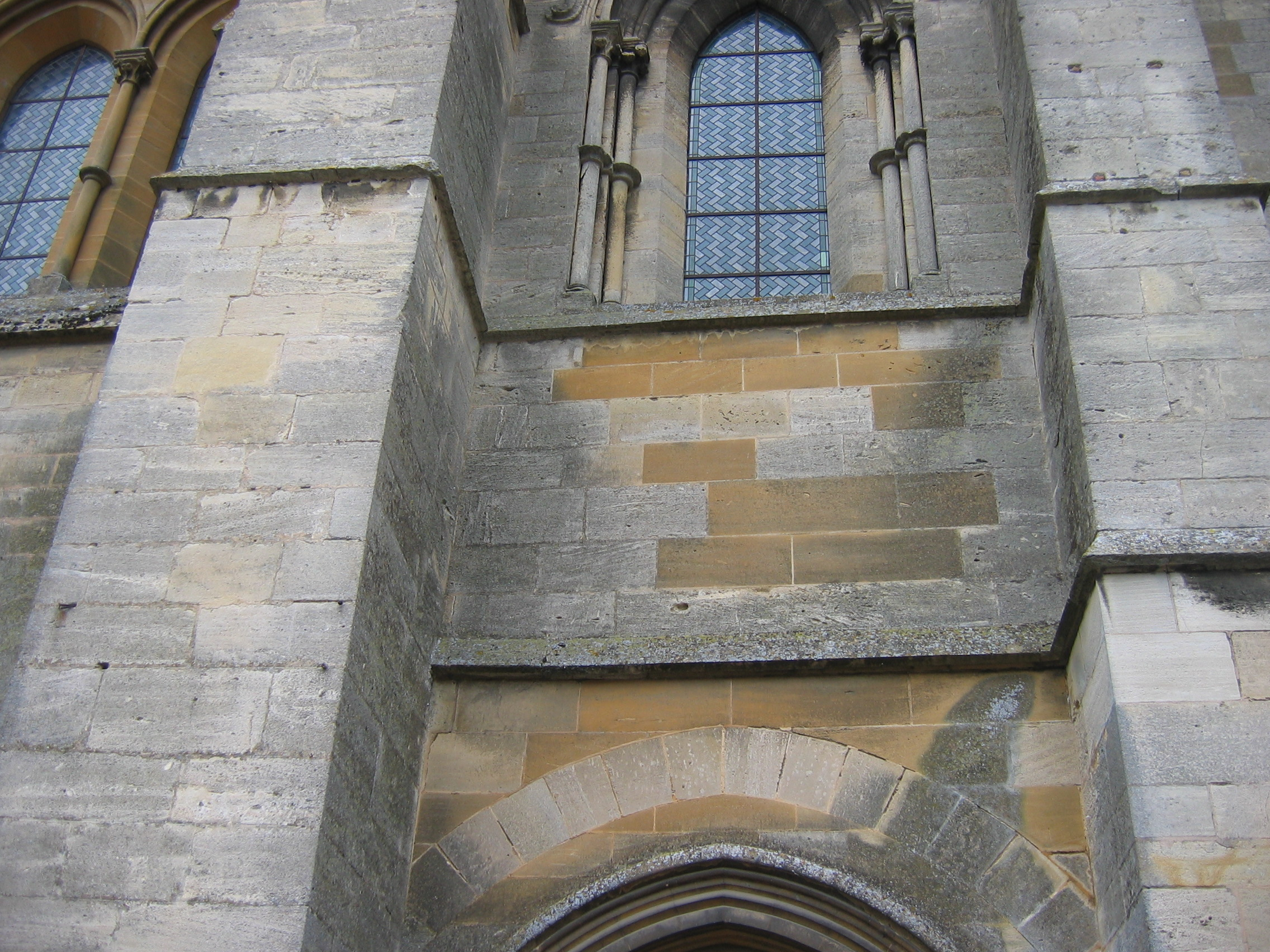 Differences de couleur entre les pierres (indice de la restauration) Abbatiale Mouzon Ardennes France